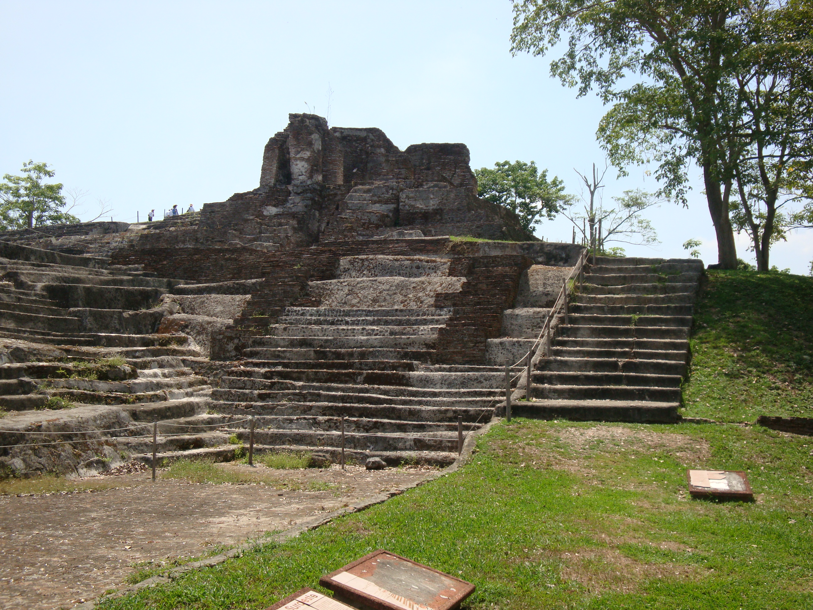 Templo IV en este templo se descubrió una cripta funeraria que había sido tapada al construir la escalera. Al píe de este templo, en la denominada "Plaza Suroeste" se descubruó un entierro múltiple. Ciudad maya de Comalcalco, Tabasco, México.